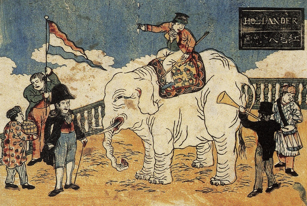 Dutch with elephant at Nagasaki